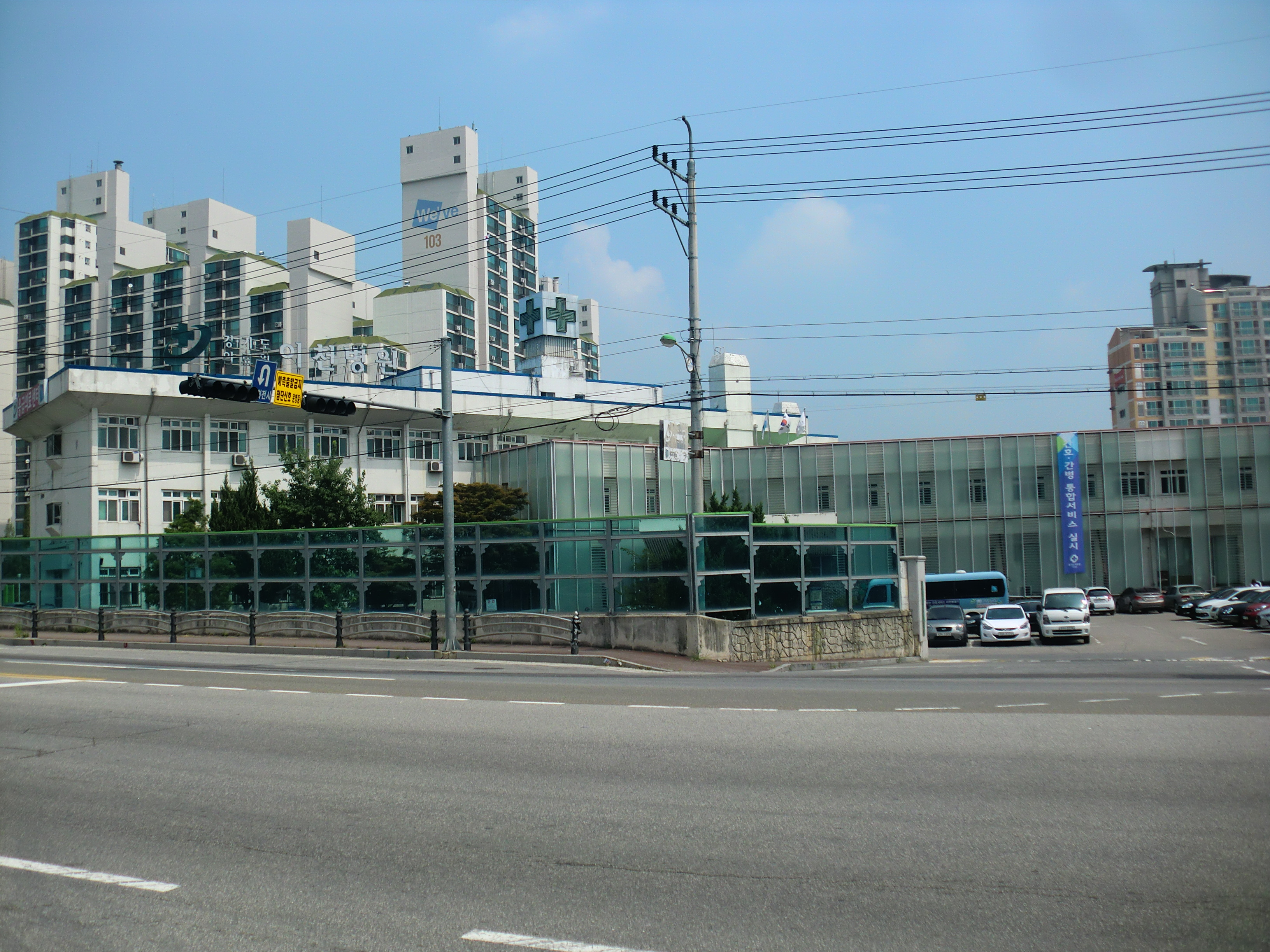 경기도 이천시에 있는 경기도 의료원 이천병원